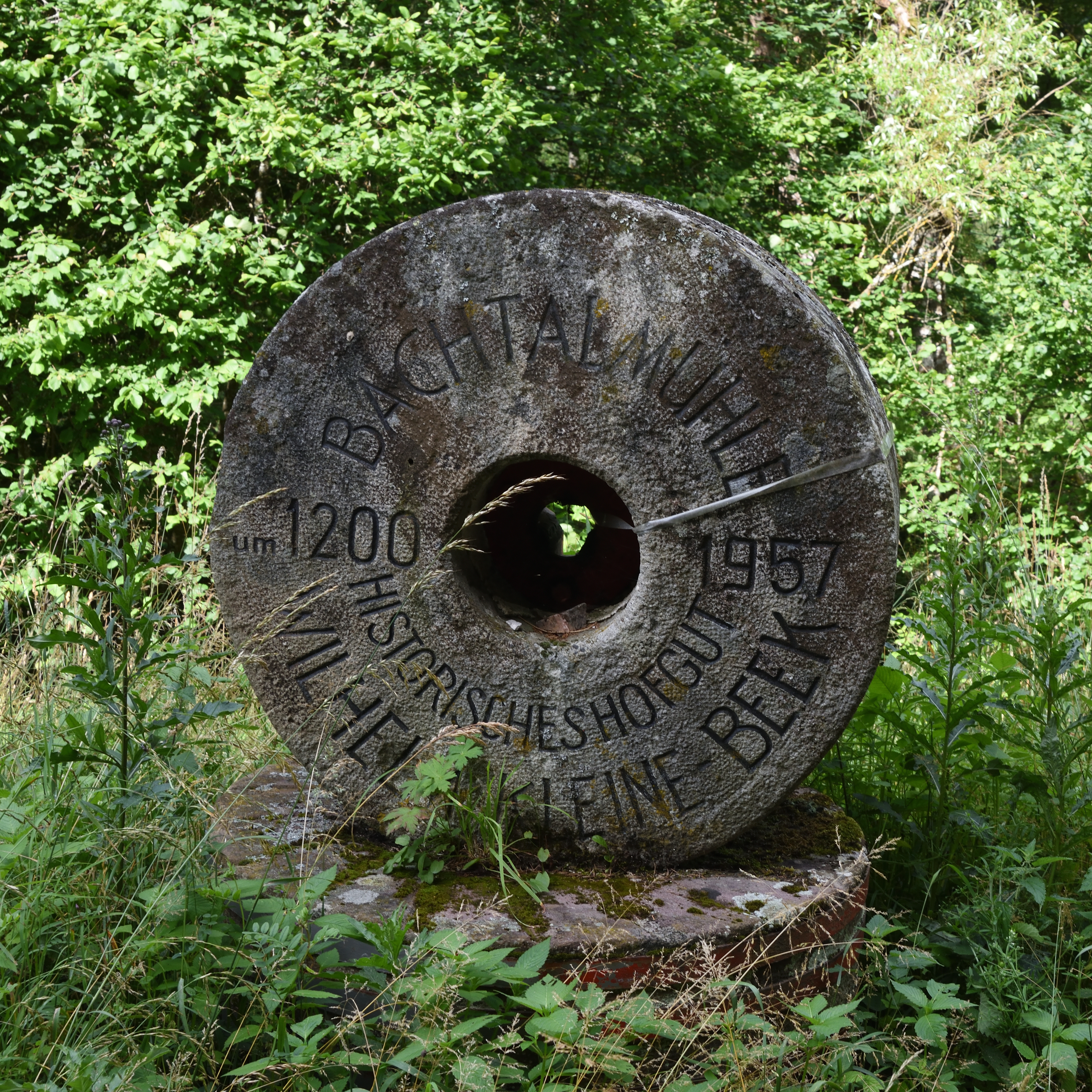 Ewattingen, Bachtalmühle, Mühlstein mit Gravur zur Geschichte des Gehöfts